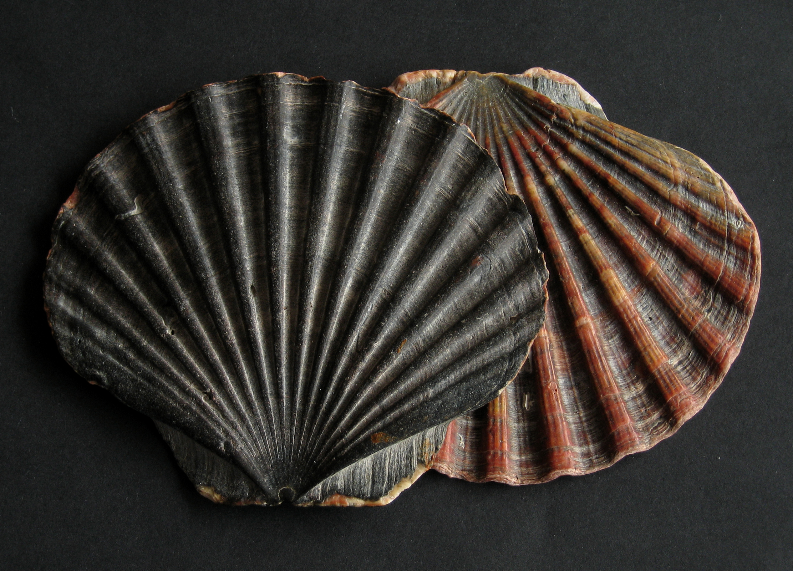 Pecten maximus - große Pilgermuschel